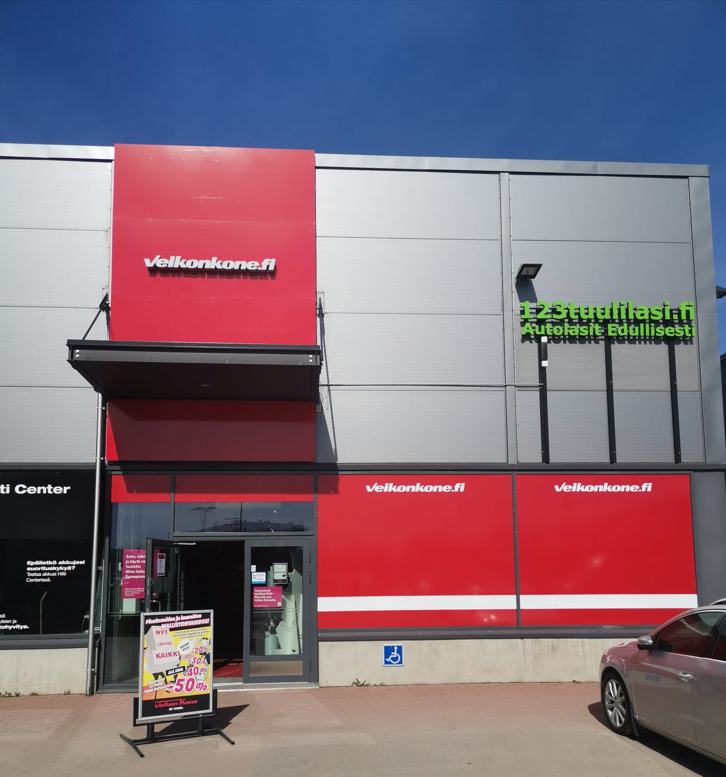 Veikon Koneen nykyinen myymälä Helsingin Konalassa